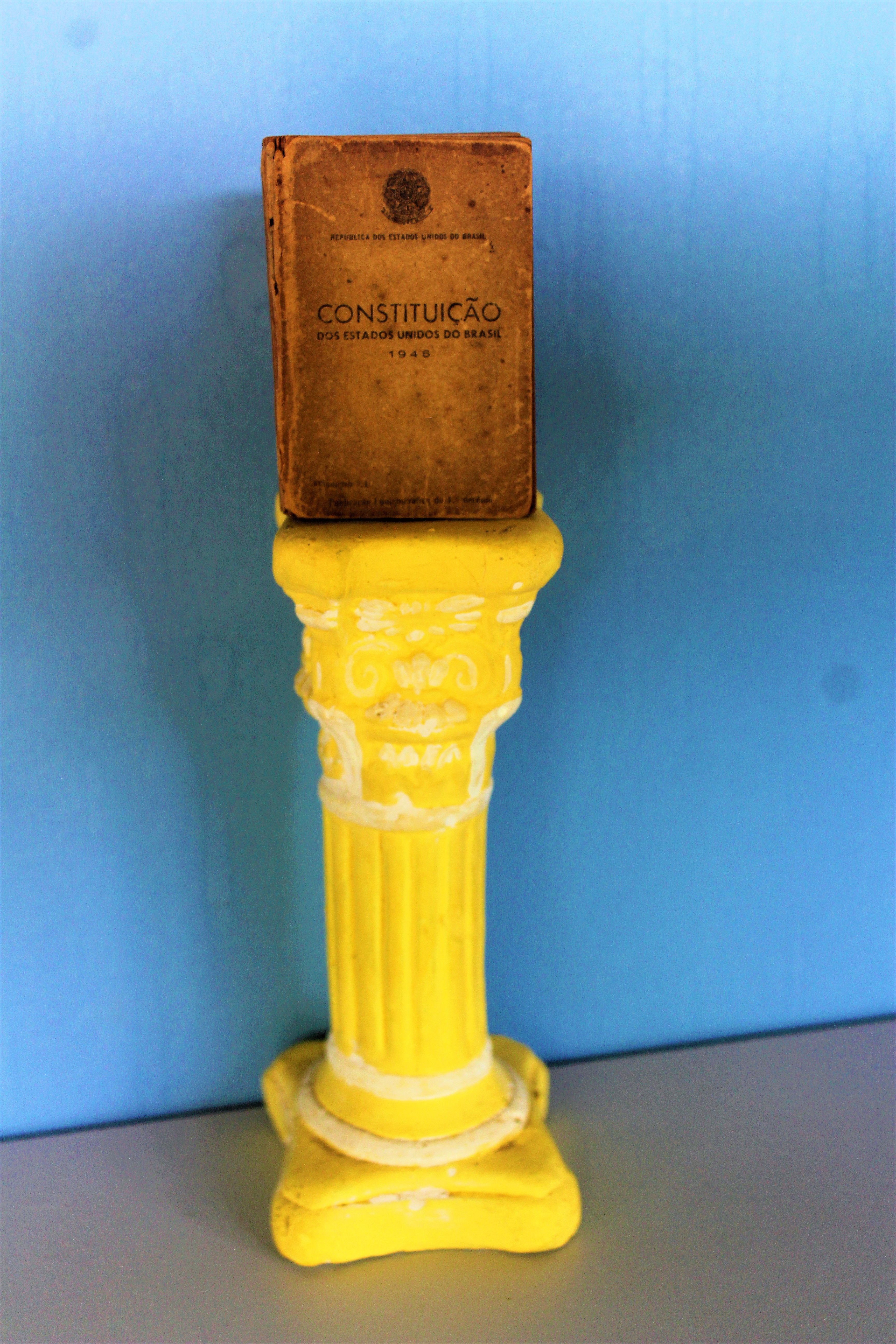 Mini exemplar da Constituição brasileira de 1946, impresso pelo IBGE, em comemoração ao primeiro decênio da Carta Constitucional de 1946.